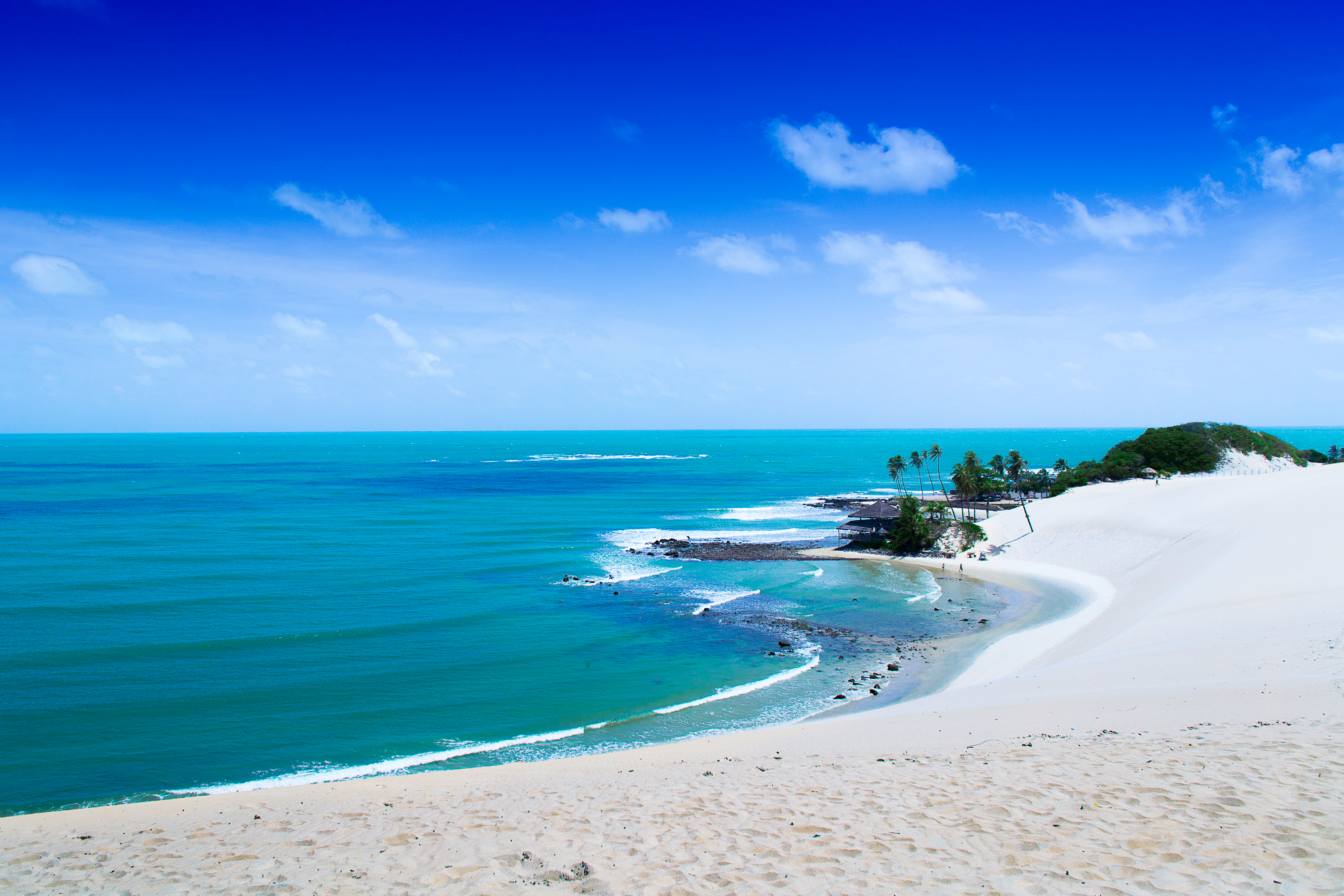 O Parque Turístico Ecológico Dunas de Genipabu engloba uma praia, um grande complexo de dunas, uma lagoa e uma área de proteção ambiental localizados no município de Extremoz, no estado do Rio Grande do Norte, no Brasil.